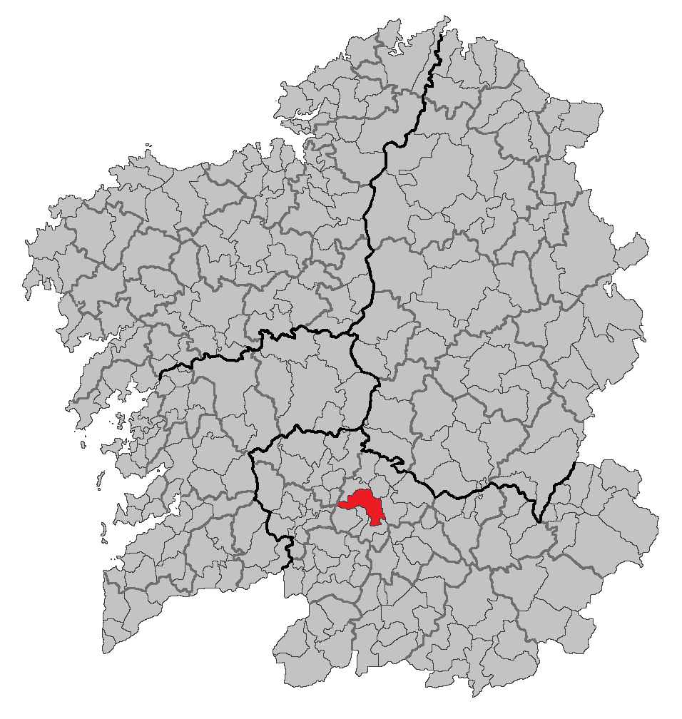 Mapa coa localización do concello de Ourense.